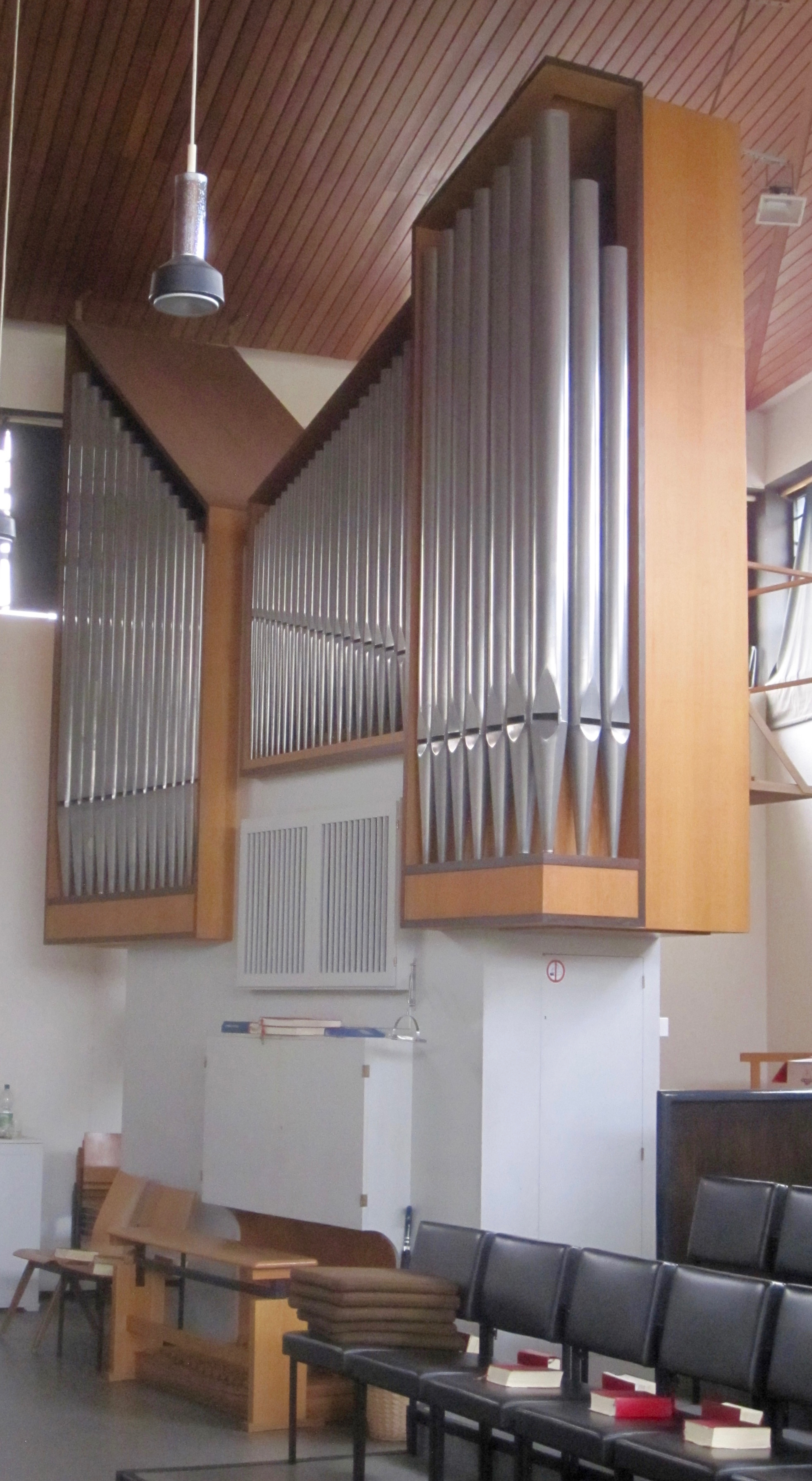 Orgel in der Auferstehungskirche Bad Salzuflen